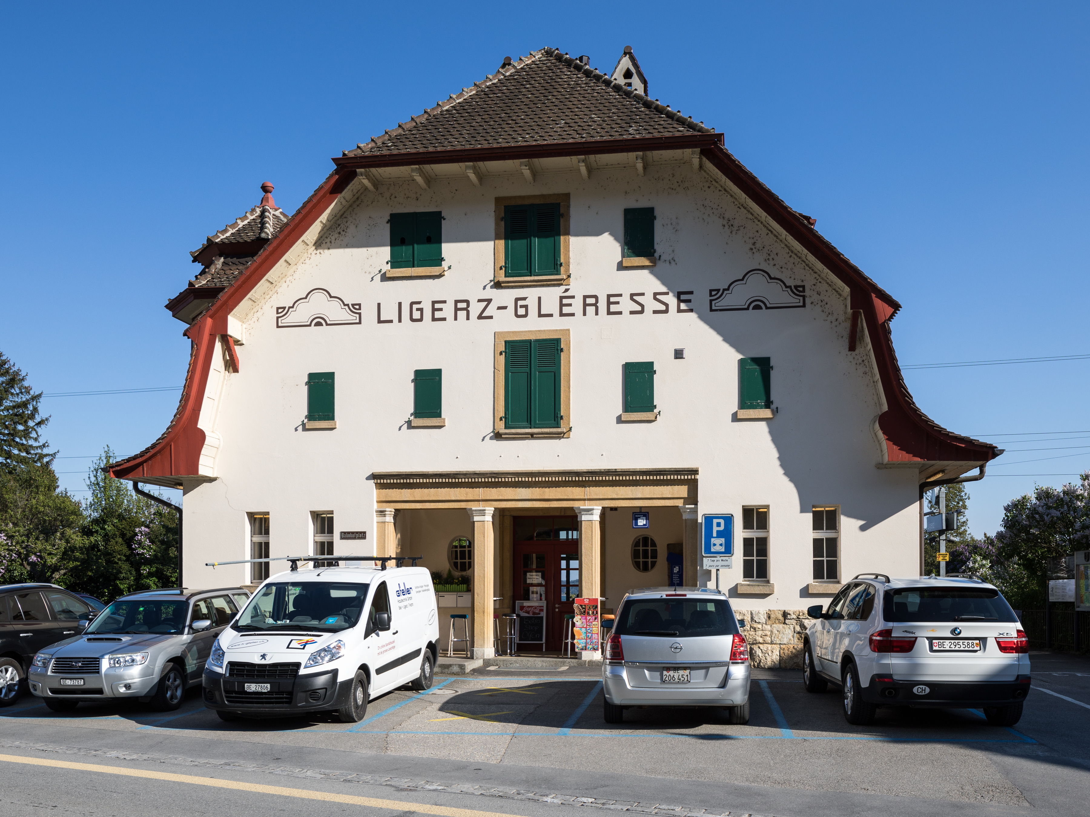 Bahnhof Ligerz